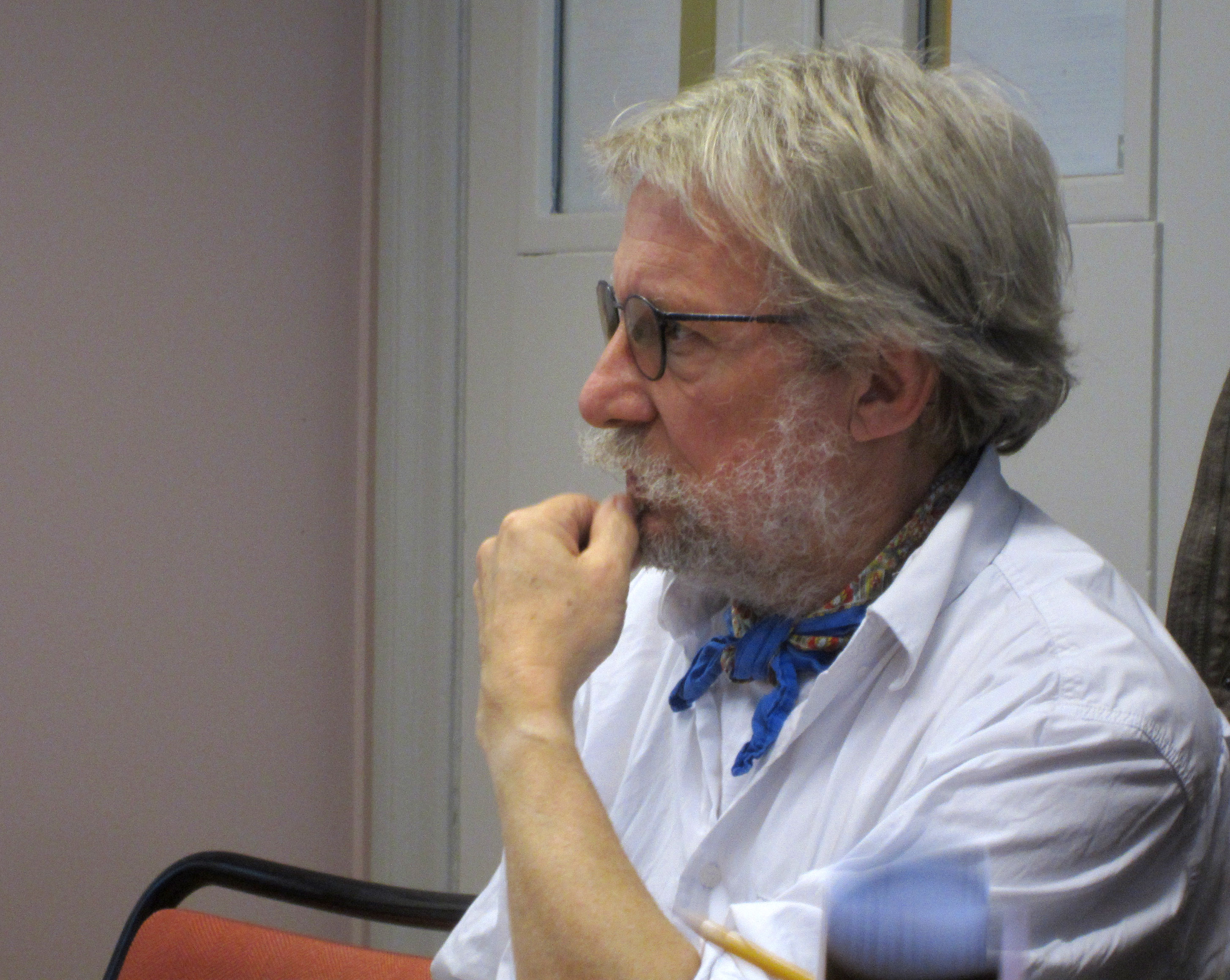 Anders Ödman 2012.